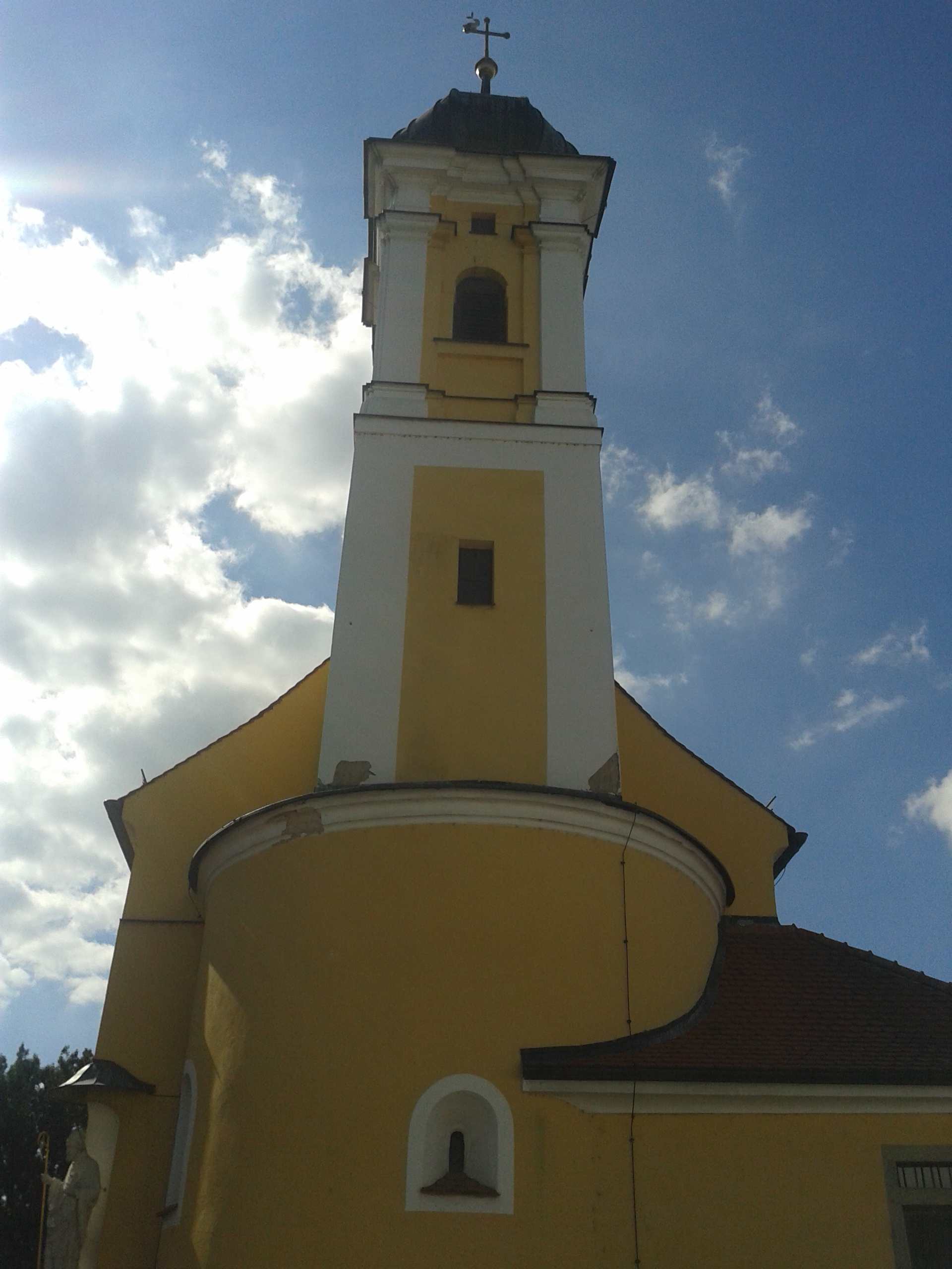 Turm der St. Nikolaus-Kirche zu Reinhausen - Regensburg; nicht sichtbar ist das Podest, auf dem die ganze Kirche steht (ca. 1,50m)